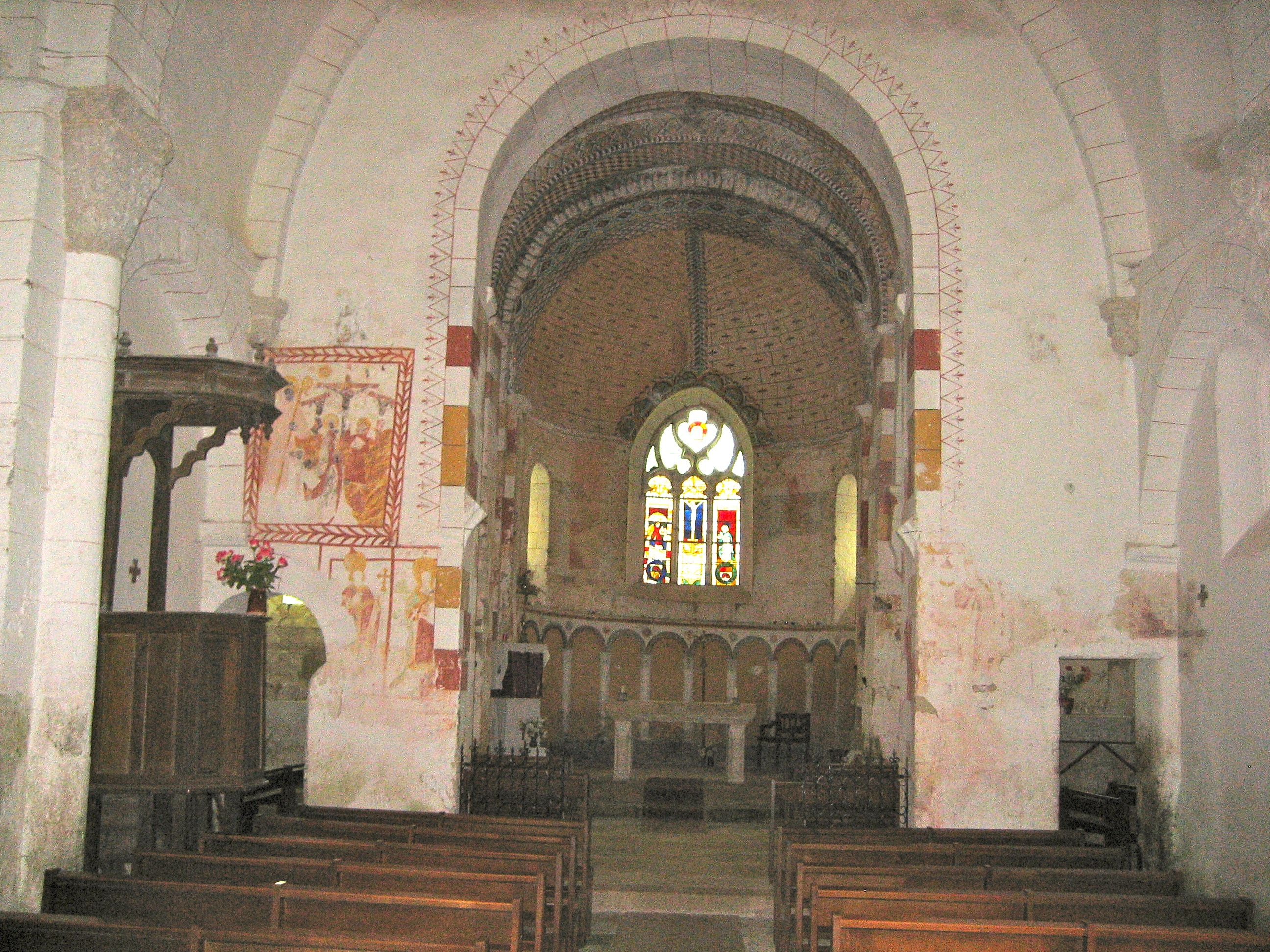 Nef de l'église Saint-Georges de Saint-Jeanvrin